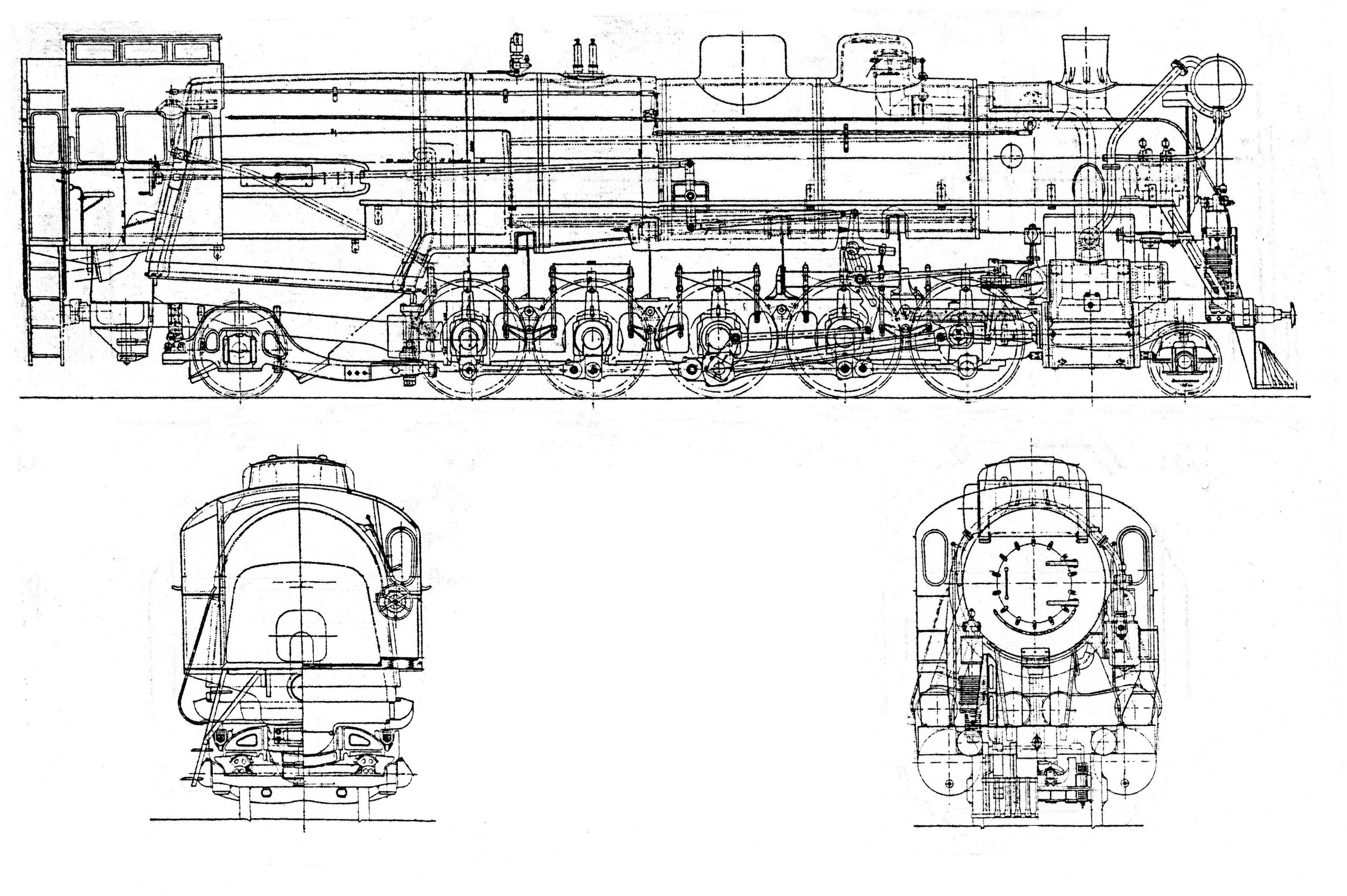 Lok.ФД20-1.(3030909).jpg Конструктивная схема паровоза ФД20-1